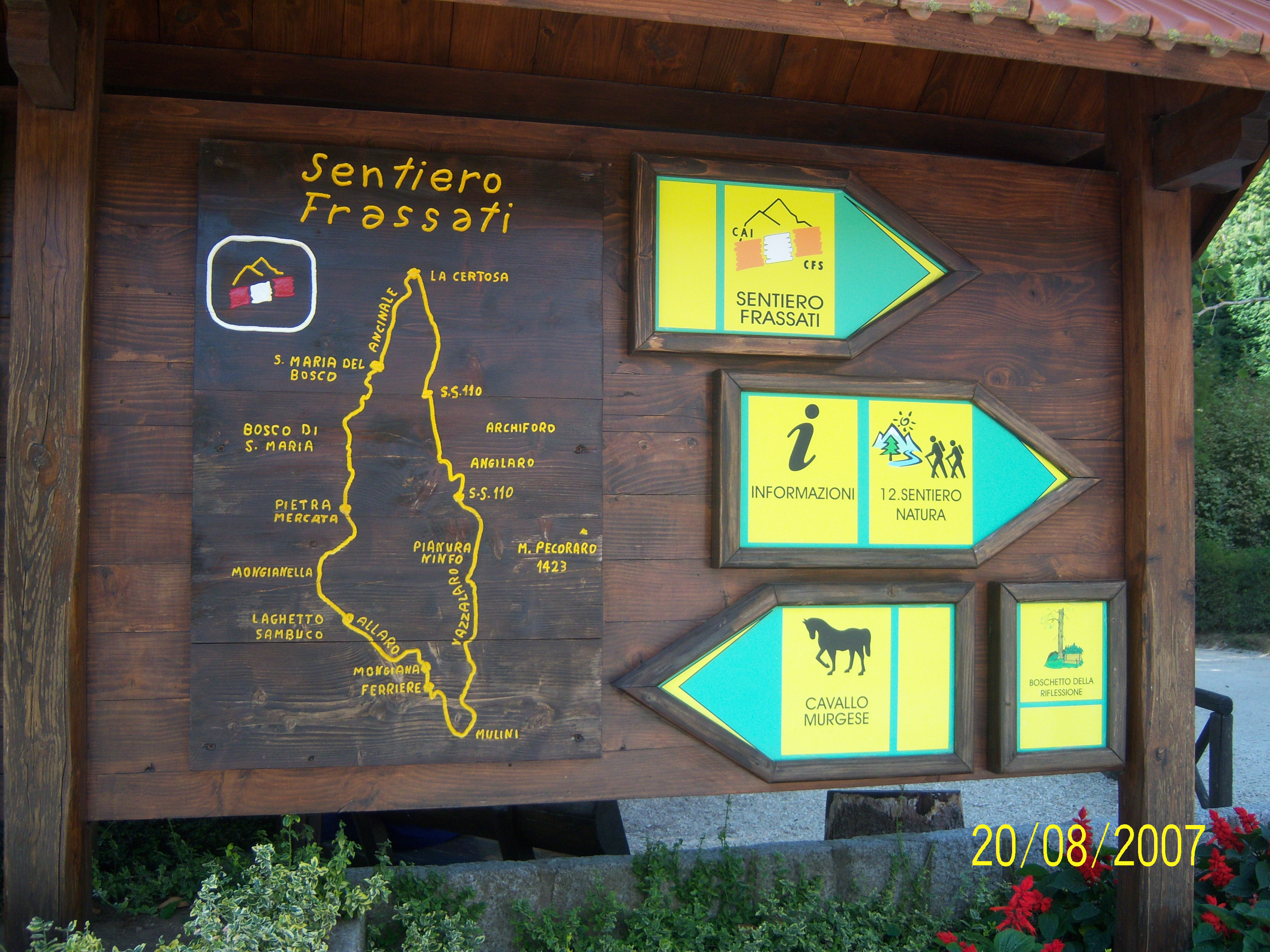 Cartello esplicativo del Sentiero Frassati della Calabria